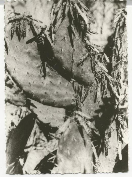 בתוך מתקפת הארבה, חינגה קטנה